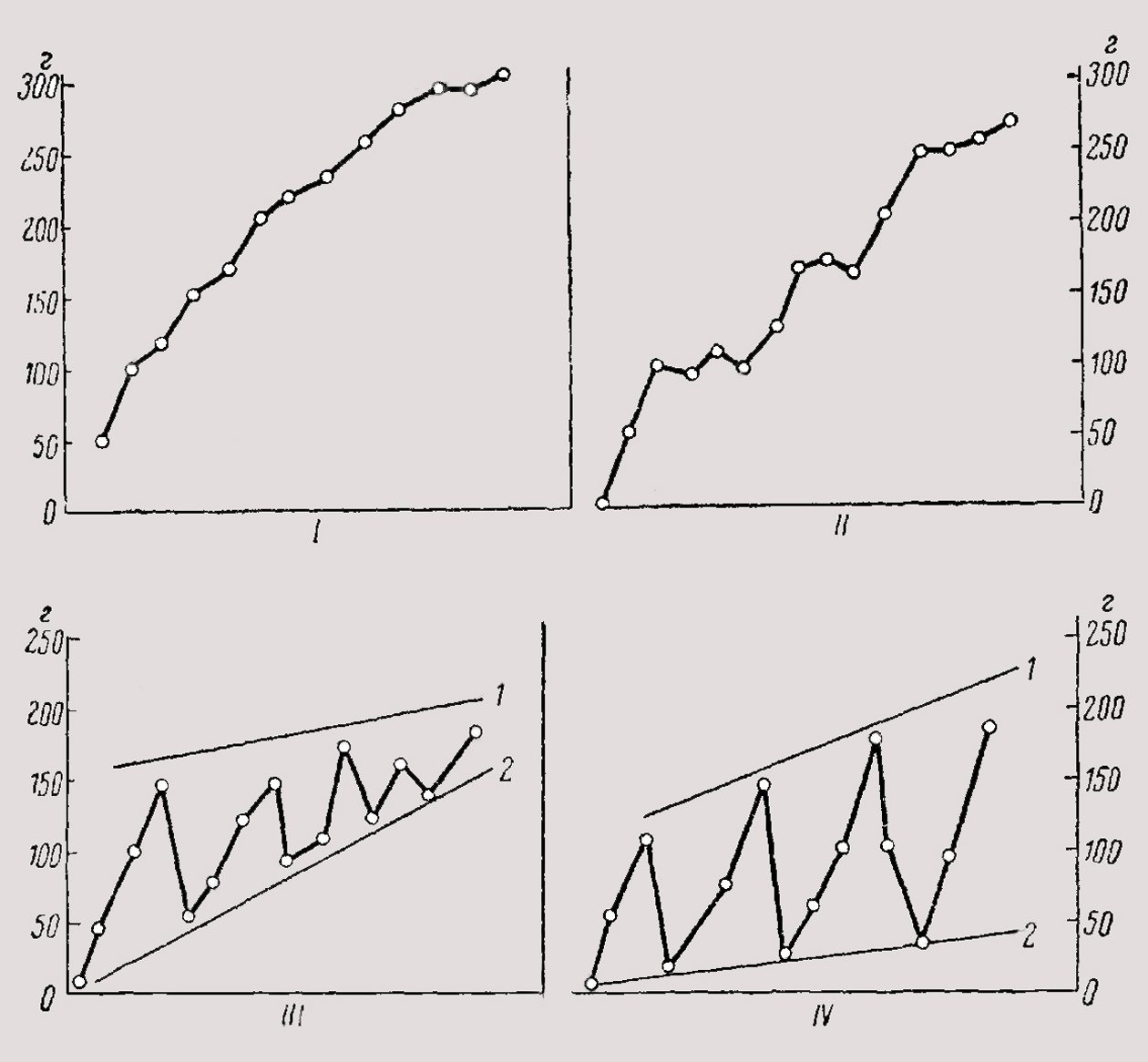 Типы весовых кривых в грудном возрасте по В. Л. Стыриковичу